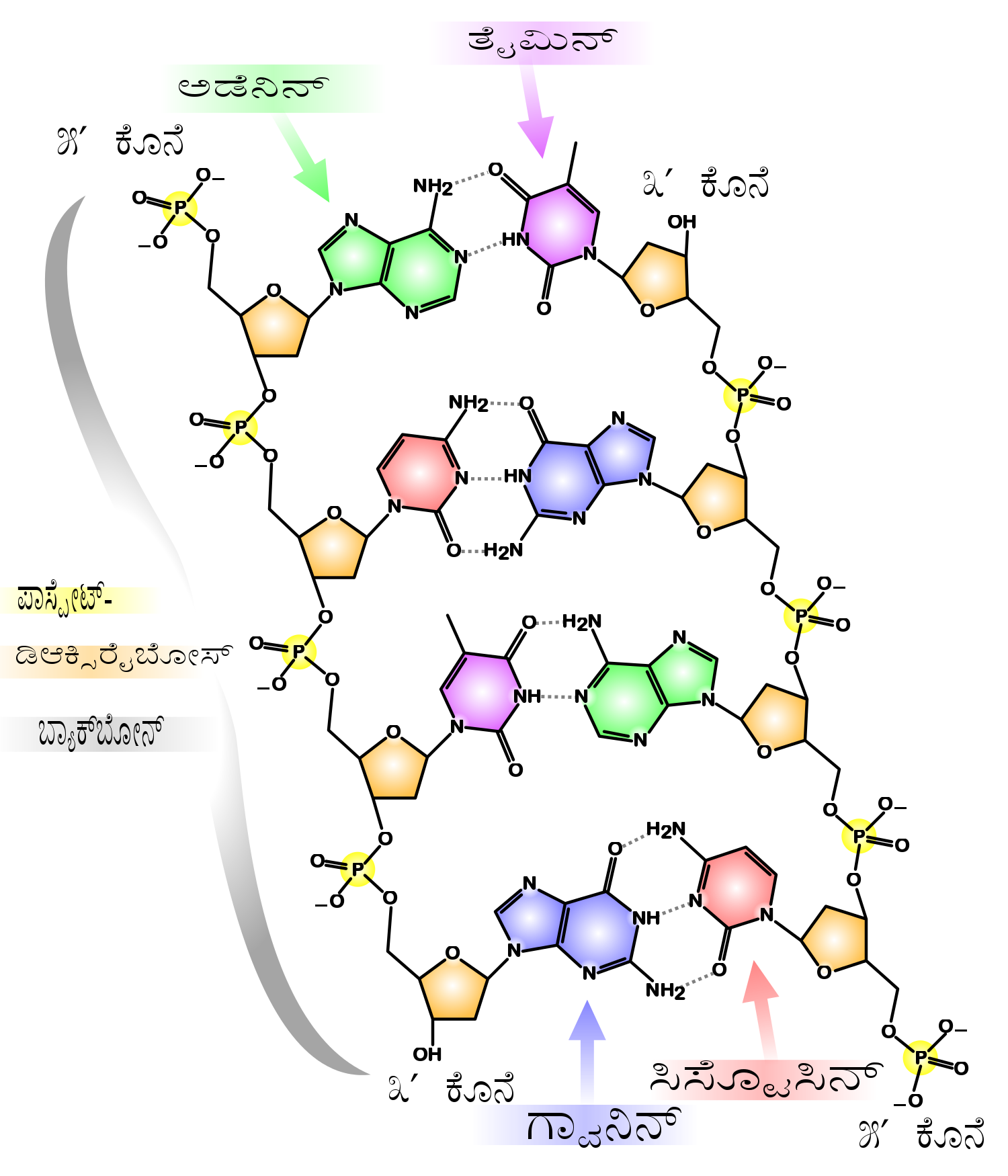 ಕನ್ನಡ: ಡಿಎನ್ಎ ಅಣು ರಚನೆ: ಡಿಎನ್‌ಎ ಎರಡು ಎಳೆಗಳು ಪ್ರತಿ-ಸಮಾಂತರವಾಗಿ (೫’ ಕೊನೆಯೊಂದಿಗೆ ೩’ಕೊನೆ ಮತ್ತು ೩’ ಕೊನೆಯೊಂದಿಗೆ ೫’) ಸೇರುವುದನ್ನು ತೋರಿಸುತ್ತದೆ.